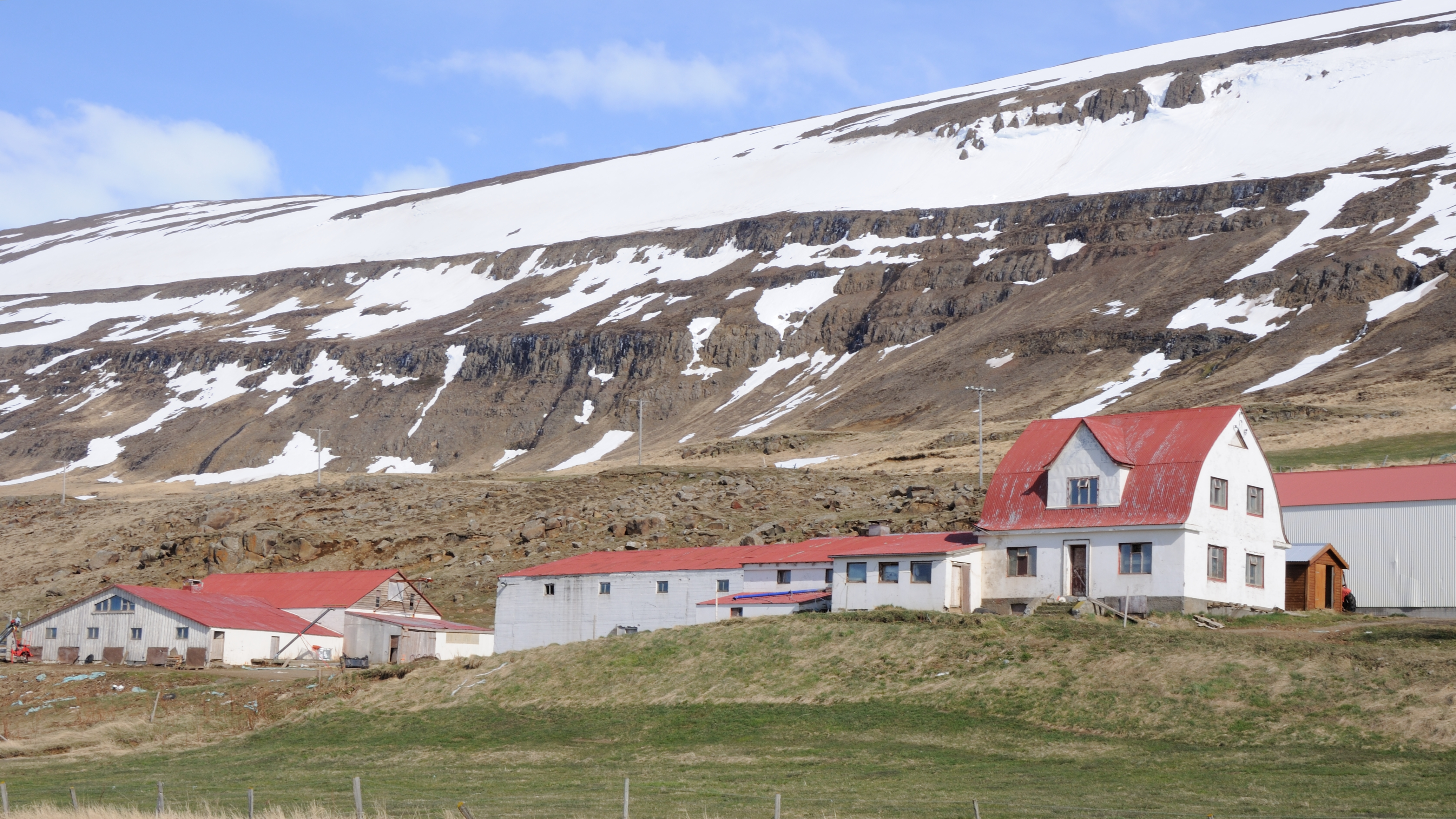 Iceland , farm along Eyjafjörður